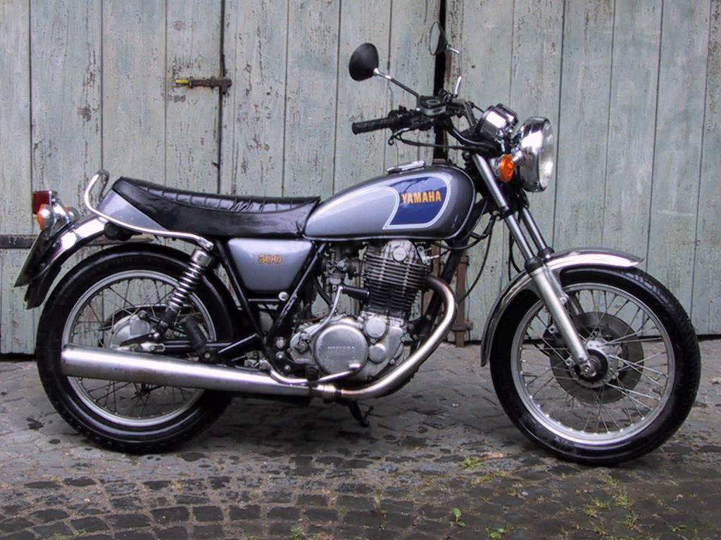 Das gute Stück / Yamaha SR 500